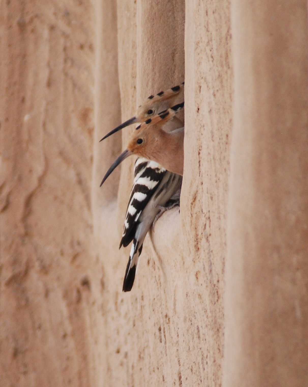 Upupa epops Lotan